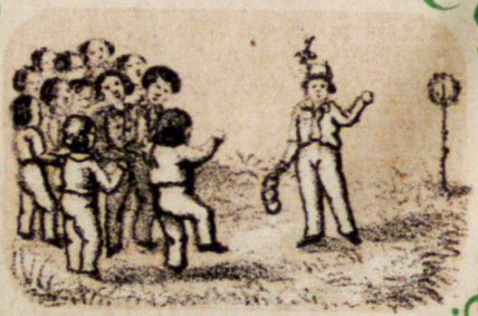 Illustration zu: Der kleine Kinderfreund : mit 76 Bildern in Tondruck. H. Müller-Schmid, Glarus (Schweiz), [1860?] 15. Schwarzer Mann